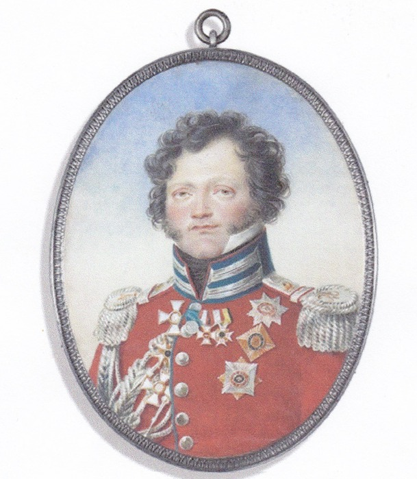 Генерал Федор Петрович Уваров